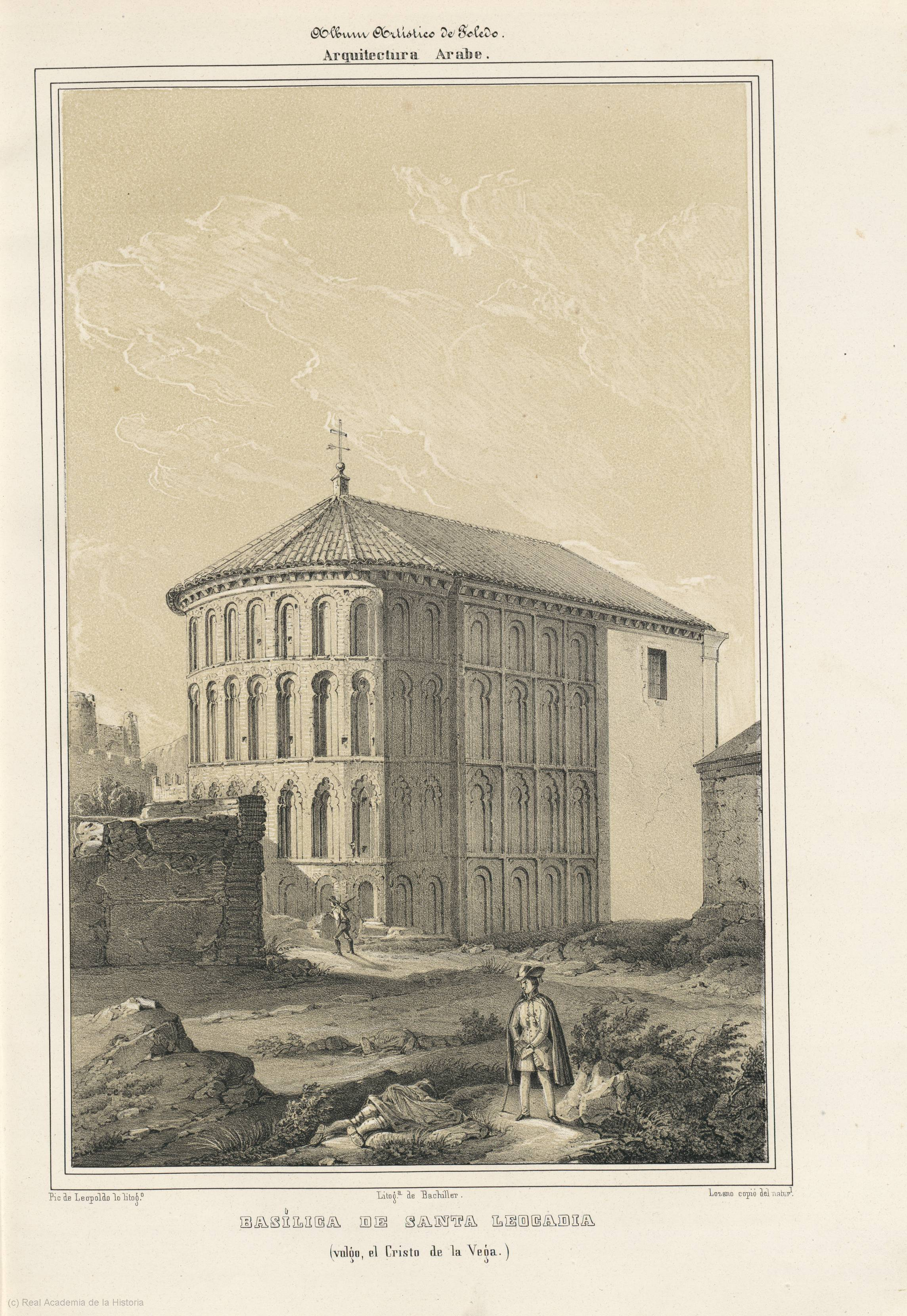 Basílica de Santa Leocadia de Toledo (ermita del Cristo de la Vega).